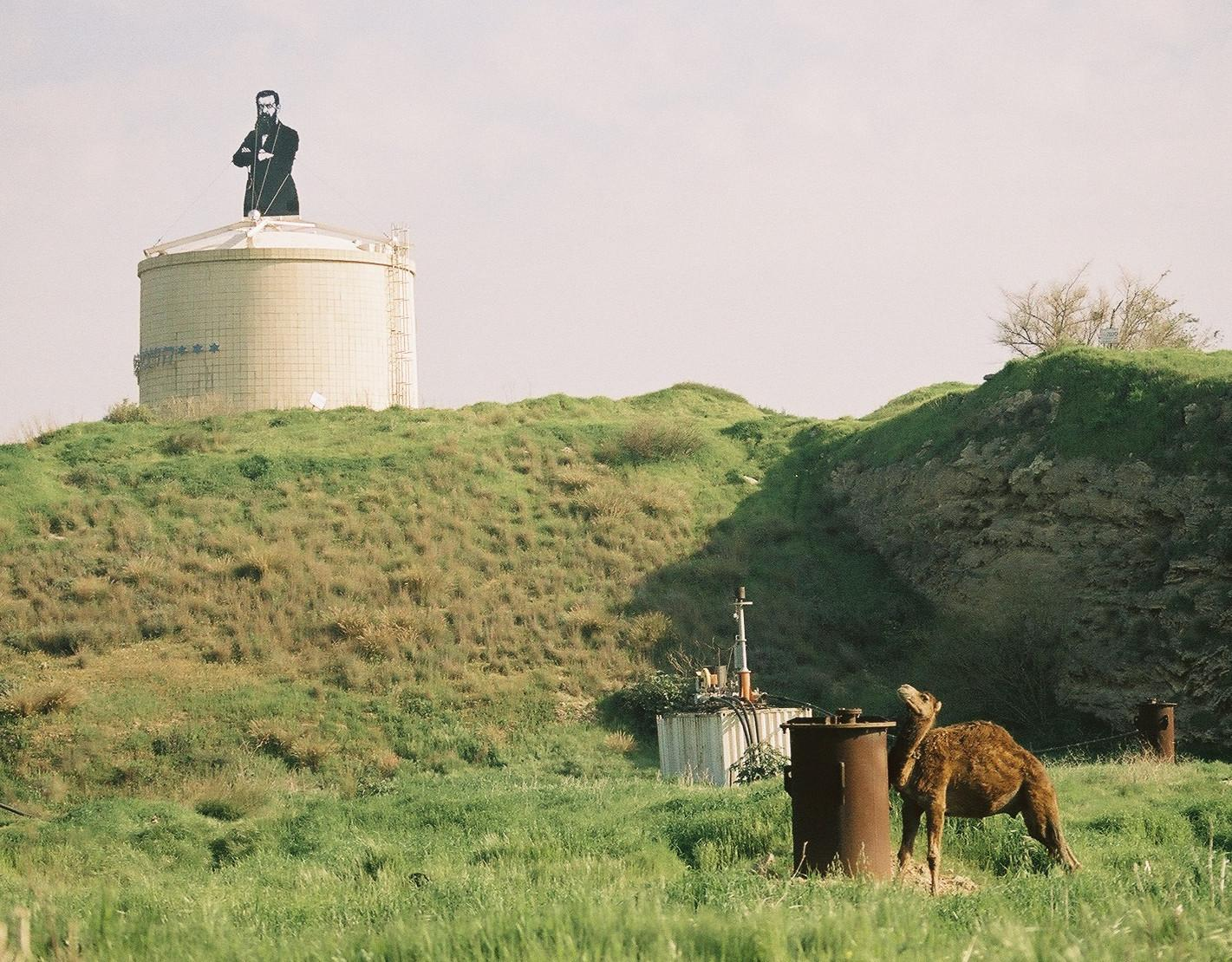 גמל סמוך לצומת הסירה בהרצליה, ברקע הפסל של הרצל.